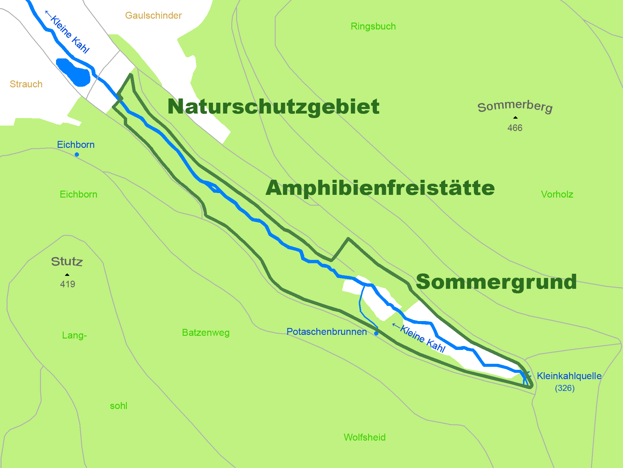 Karte des Naturschutzgebietes Amphibienfreistätte Sommergrund bei Kleinkahl, Bayern Grünfläche, Wiesen Wald Gewässer Berg 466 Höhe über Normalhöhennull Feld- und Waldwege Naturschutzgebietsgrenze Fink Flurname Quelle